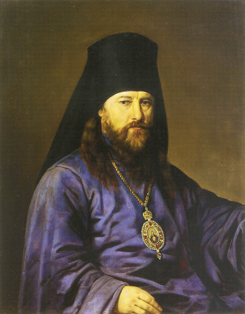 Портрет неизвестного архиерея. Возможно, это уникальное живописное изображение епископа Саввы (Ивана Михайловича Тихомирова, 1819—1896).